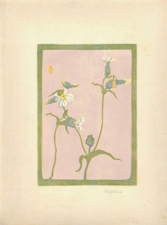 Lichtnelke